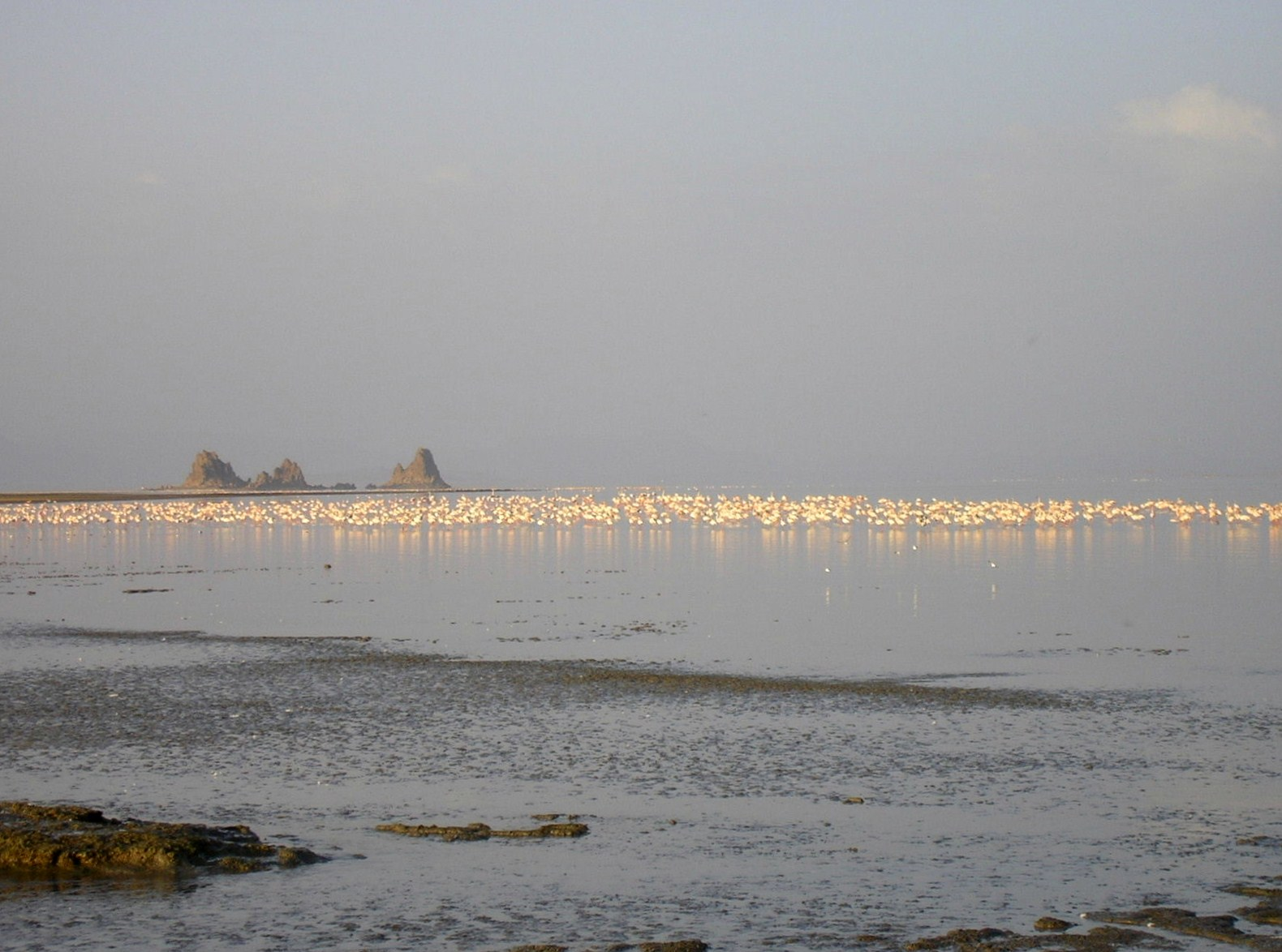 Photographie d'une colonie de flamants roses sur le Lac Abbe, en République de Djibouti.